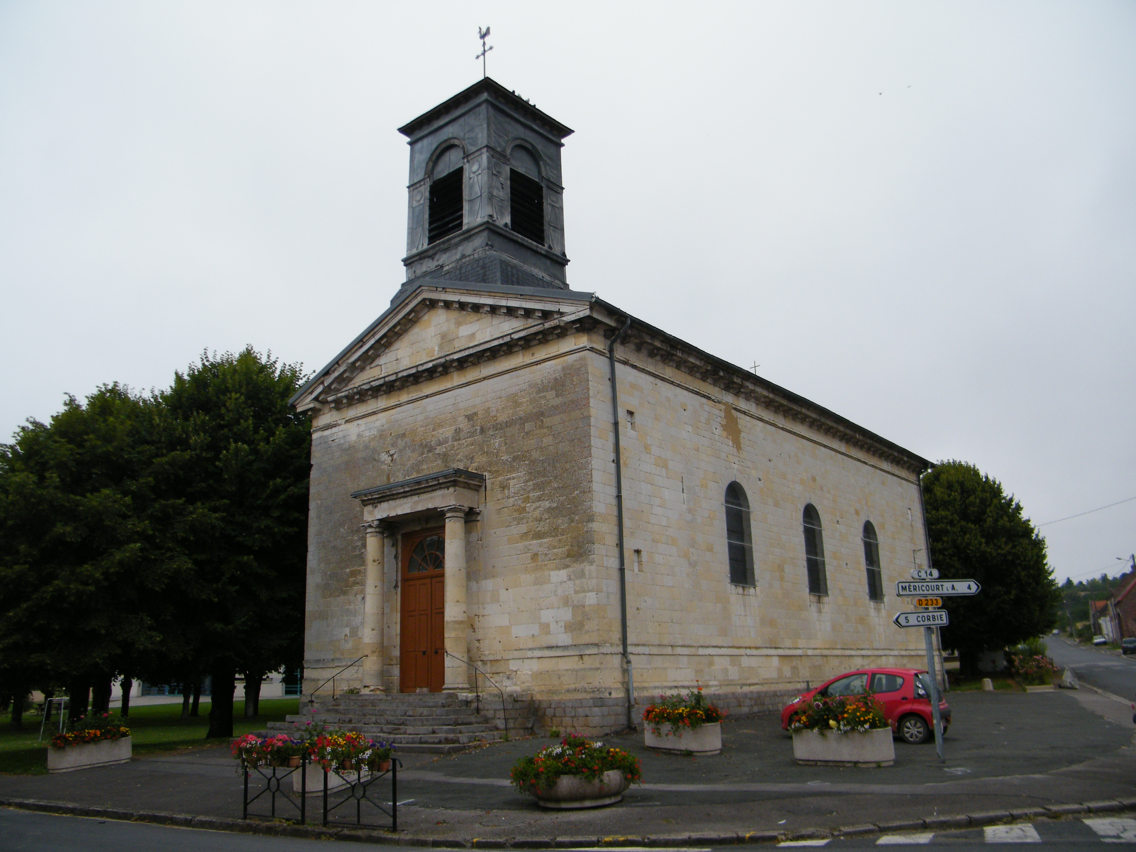 église.